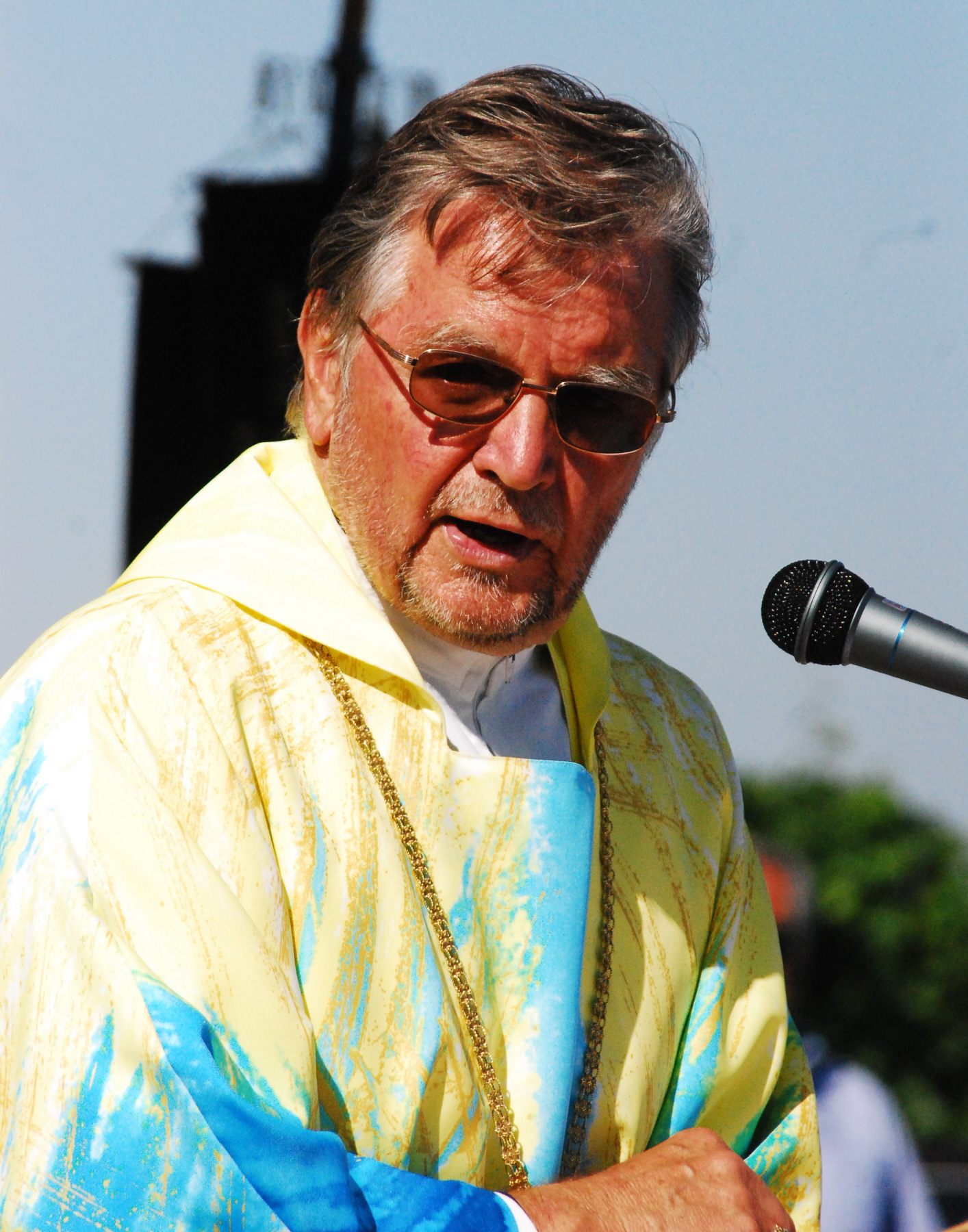 Karl Rühringer bei einer Feldmesse beim Heimatdenkmal in Unterretzbach in Niederösterreich